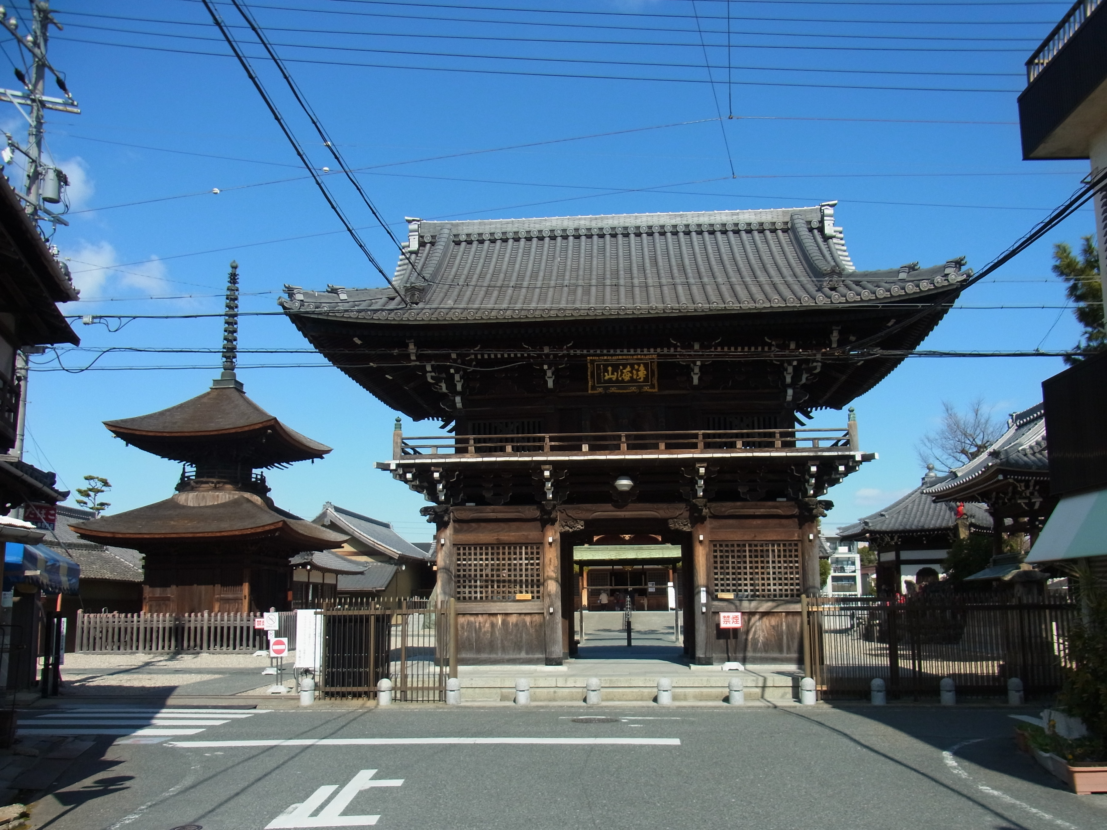 荒子観音山門